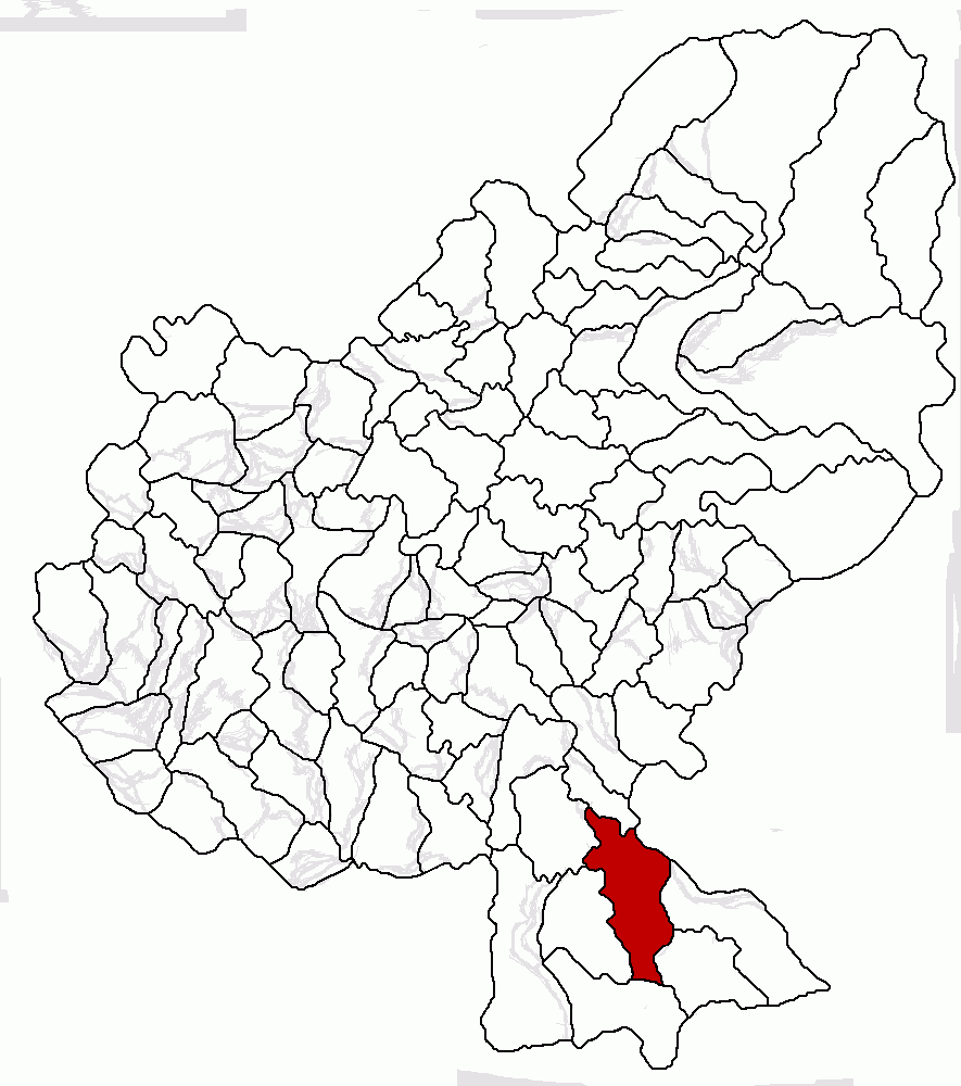 Categorie:Hărţi ale judeţului Mureş